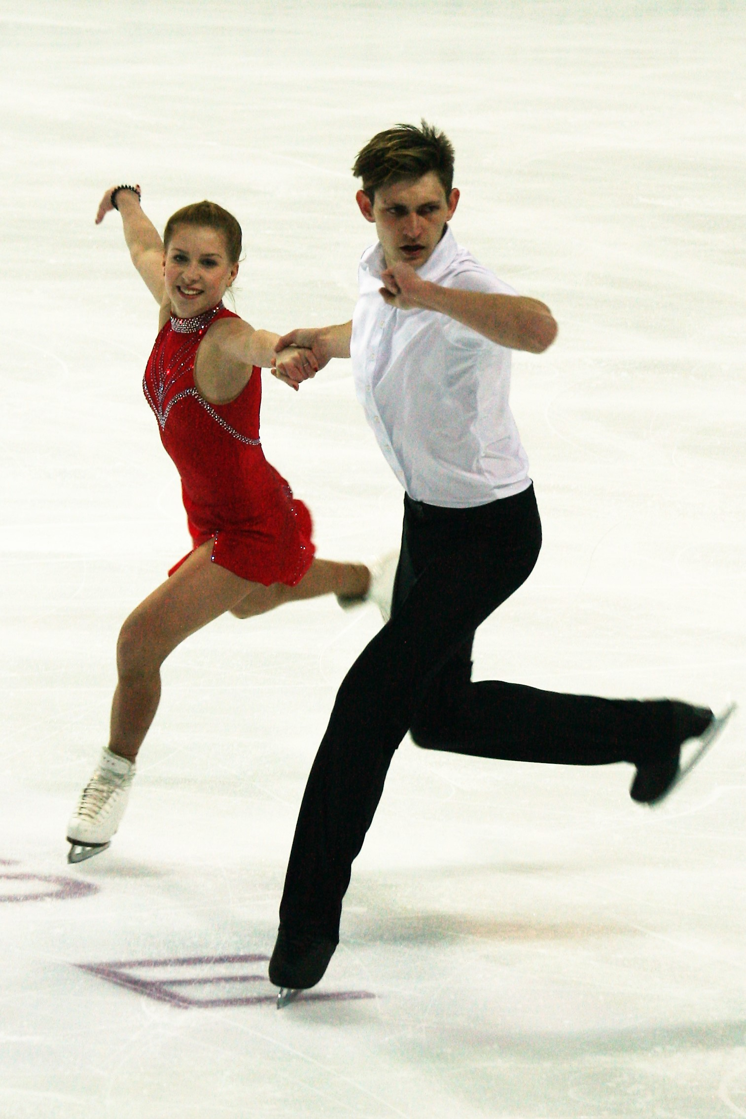 Екатерина Александровская / Харли Уиндзор (Австралия) на финале Гран-при по фигурному катанию среди юниоров 2016-2017